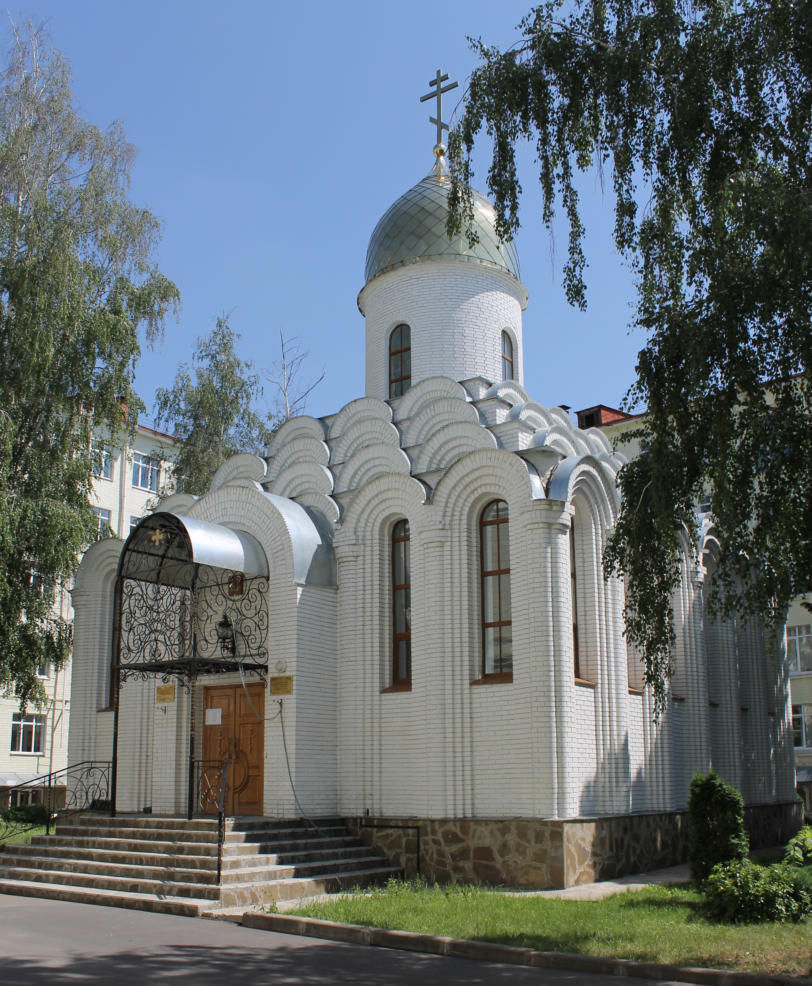 Храм Святых равноапостольных Кирилла и Мефодия в Центральном округе города Курска на территории Курского государственного университета, расположенный по адресу ул. Радищева, 33.